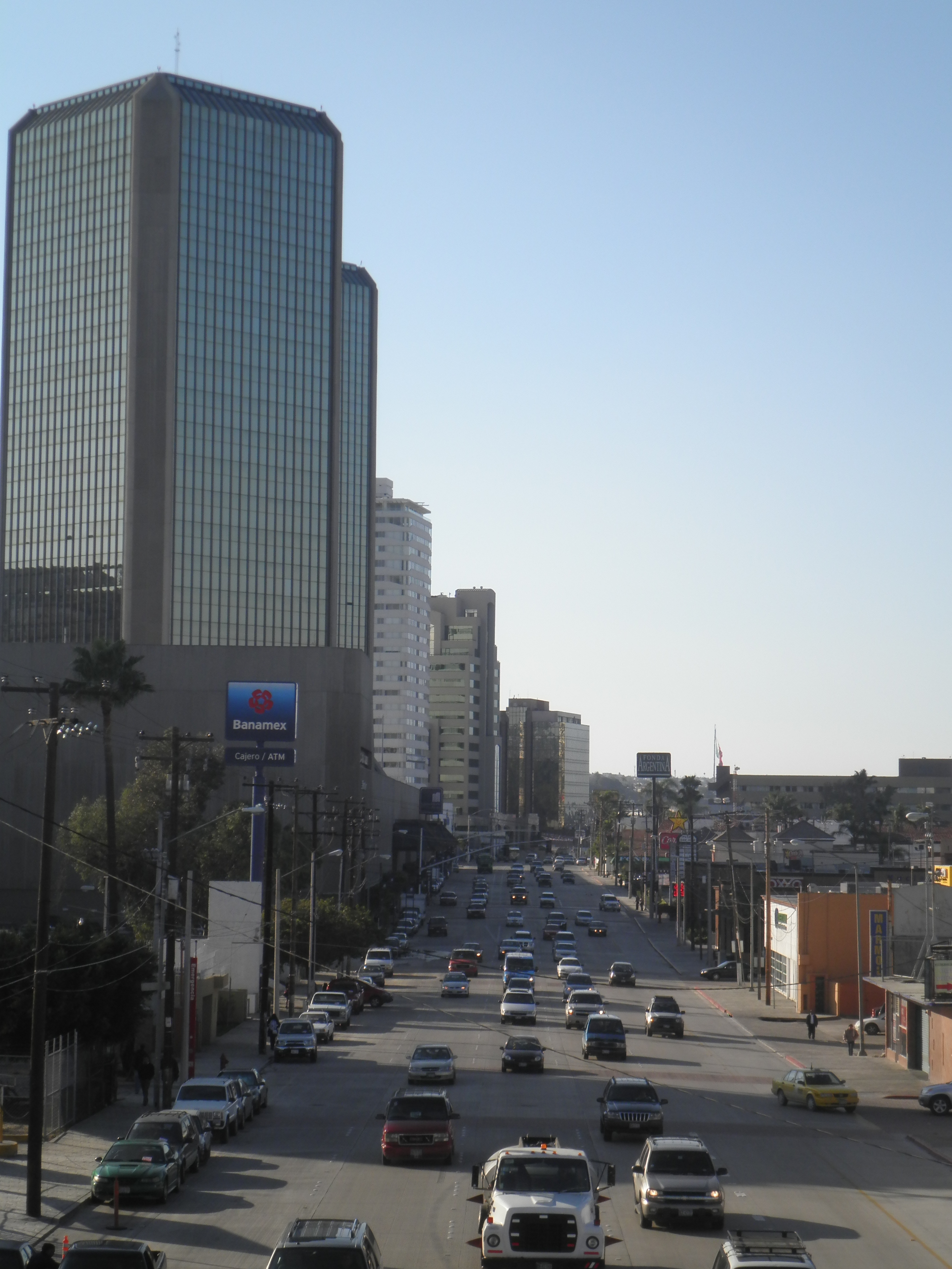 Avenida Primaria de Tijuana